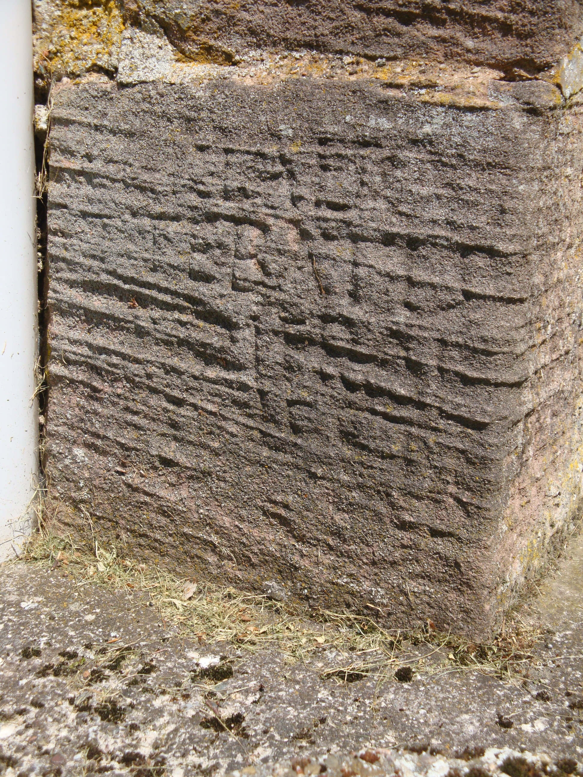 Photo de la Cense de Belfays (Belfey), Principauté de Salm, Saint Stail alt 774m, ferme seigneuriale, XVIIs grégoire LALLEMAND (1711-1786) est censier en 1736 avec sa famille (marguerite SCHENEBEL sa femme et 7 enfants) Une inscription est à déchiffrer à la base de l'angle droit du bâtiment